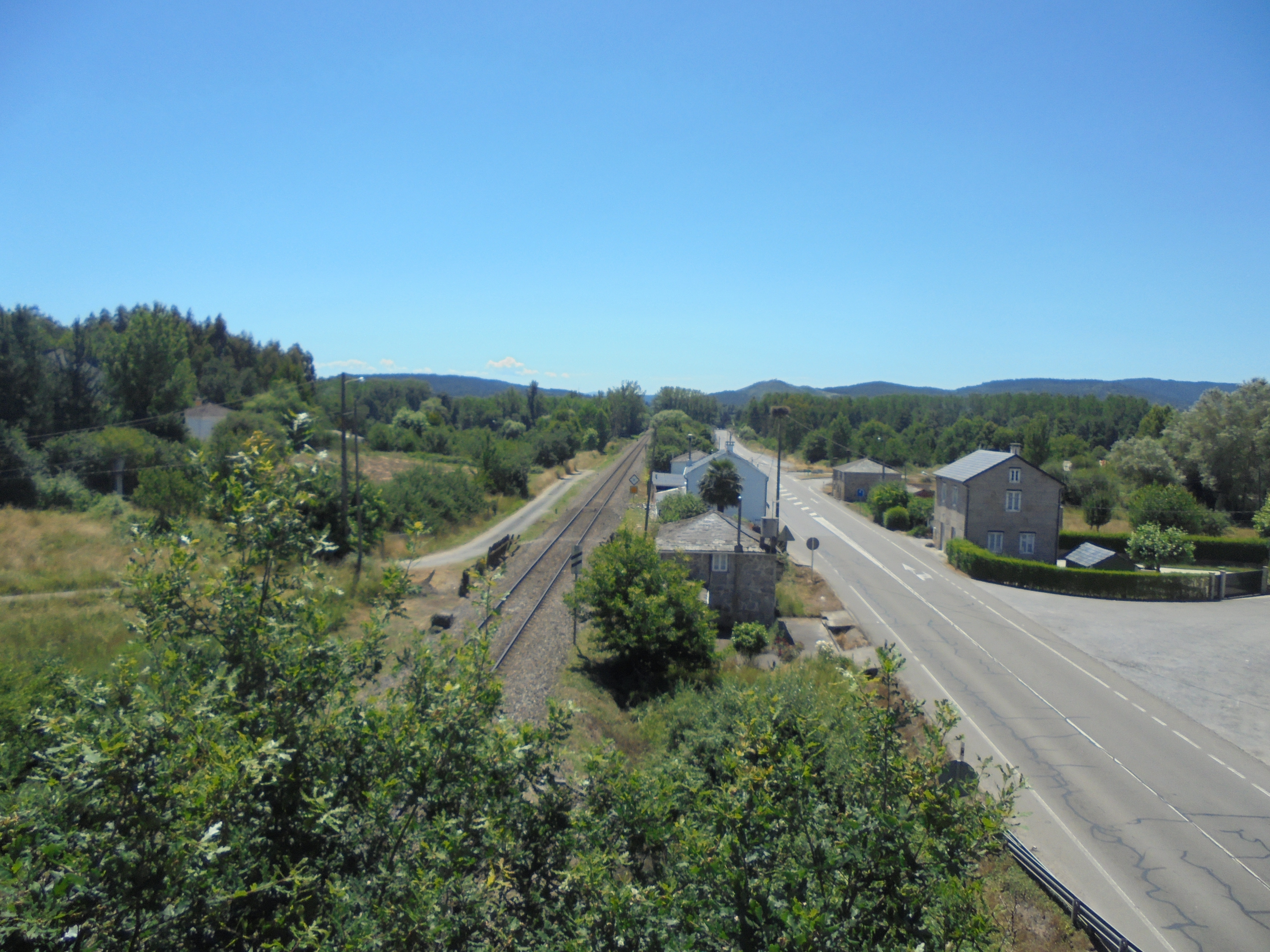 Vista de Maceda ( o Corgo)